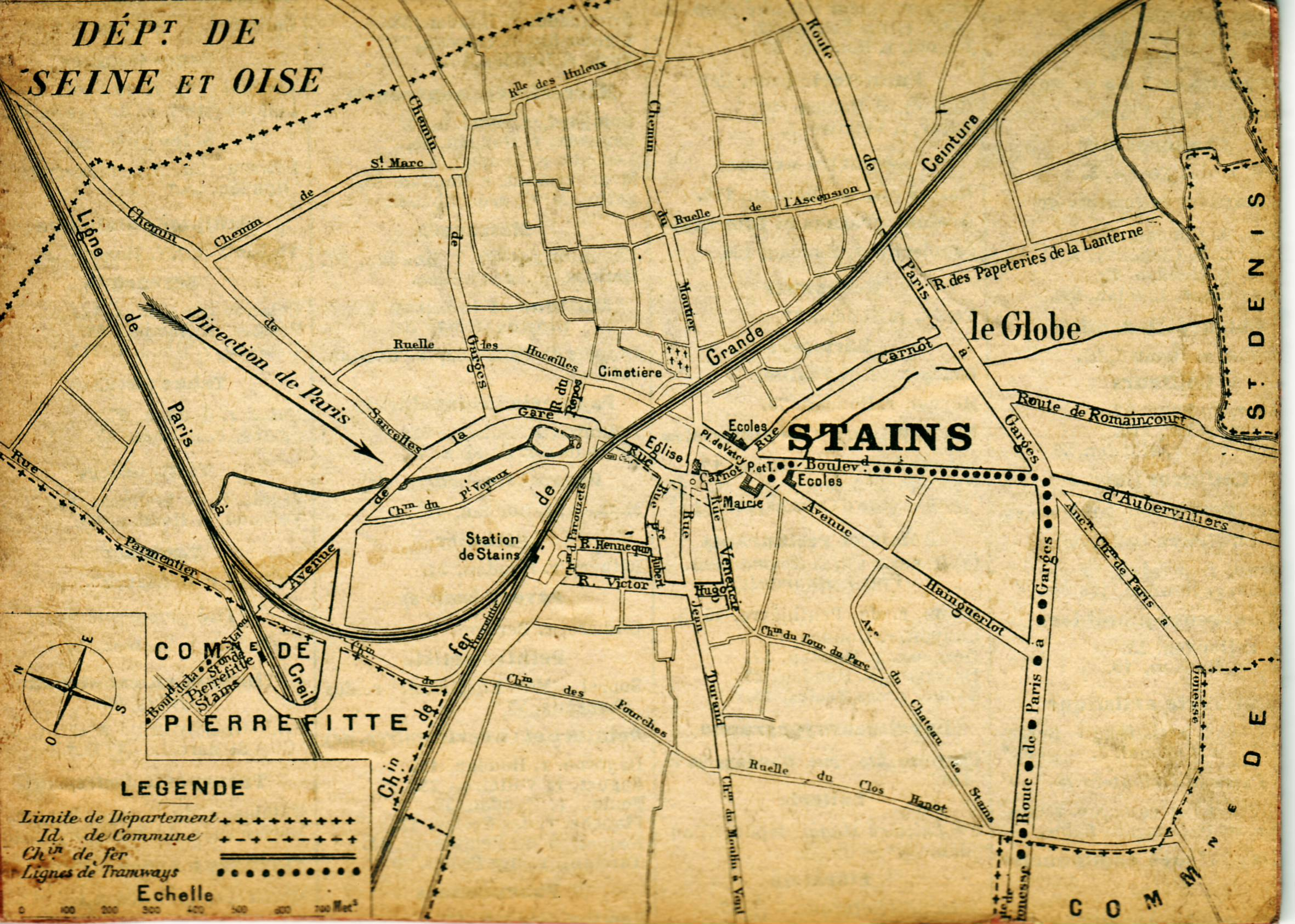 Plan de livreur de la ville de Stains